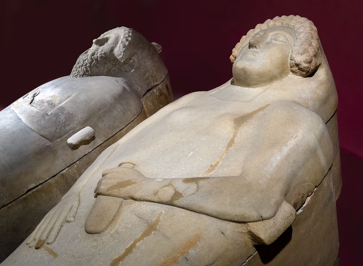 Estos son los famosos sarcófagos fenicios de Cádiz. Ambos se encontraron casualmente durante la ejecución de obras. El masculino se encontró en 1887 y el femenino en 1980. Ambos contenían restos humanos y algo de ajuar doméstico en el femenino. Se han datado a mediados del siglo V a.C.